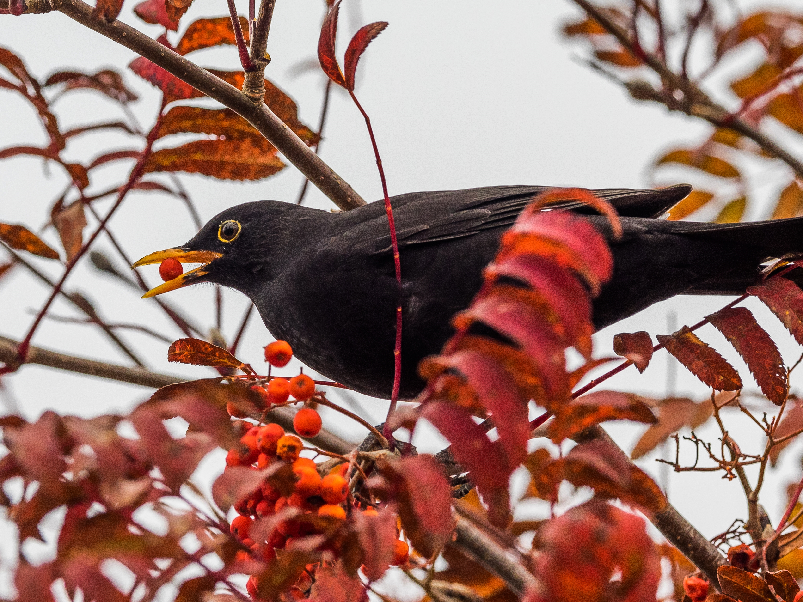 Turdus merula in Sweden 2016